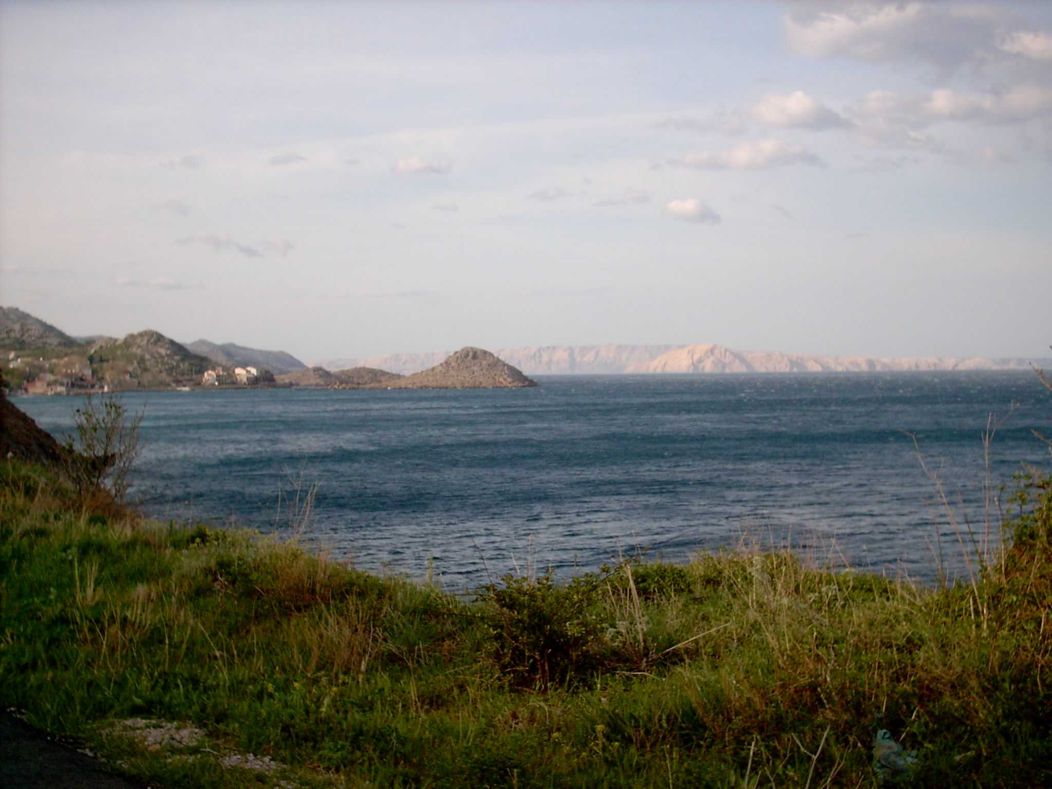 Kroatische Küste, Blick nahe Senj, im Frühling